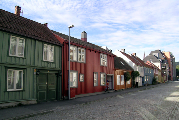 Hospitalsløkkan, Trondheim, Norway.